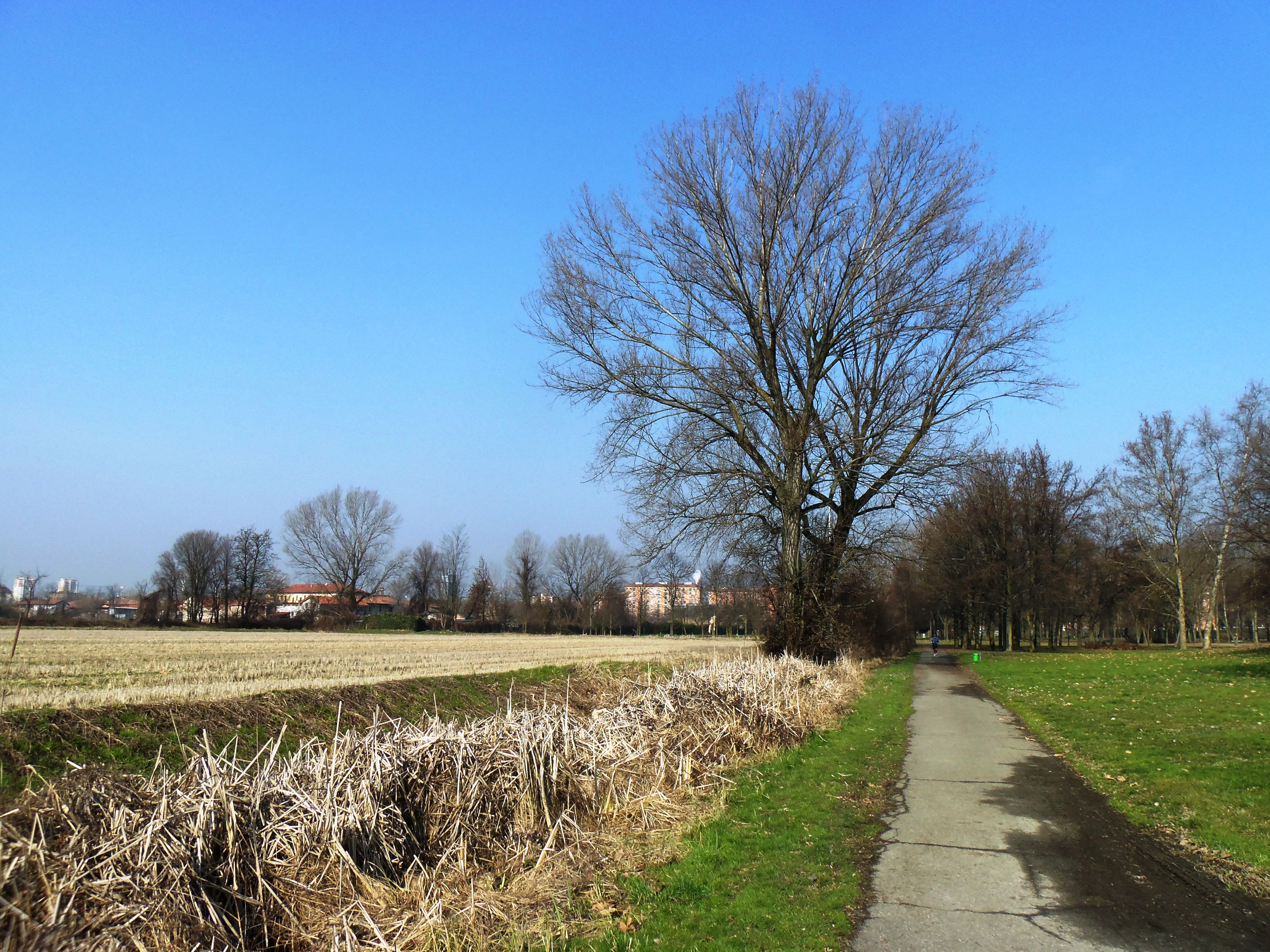 Milano, parco Andrea Campagna